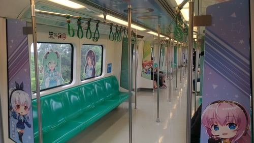 行駛中的高捷少女與初音未來聯名彩繪列車